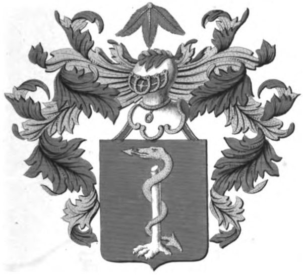 Armoiries de la famille Bernier d'Hongerswal